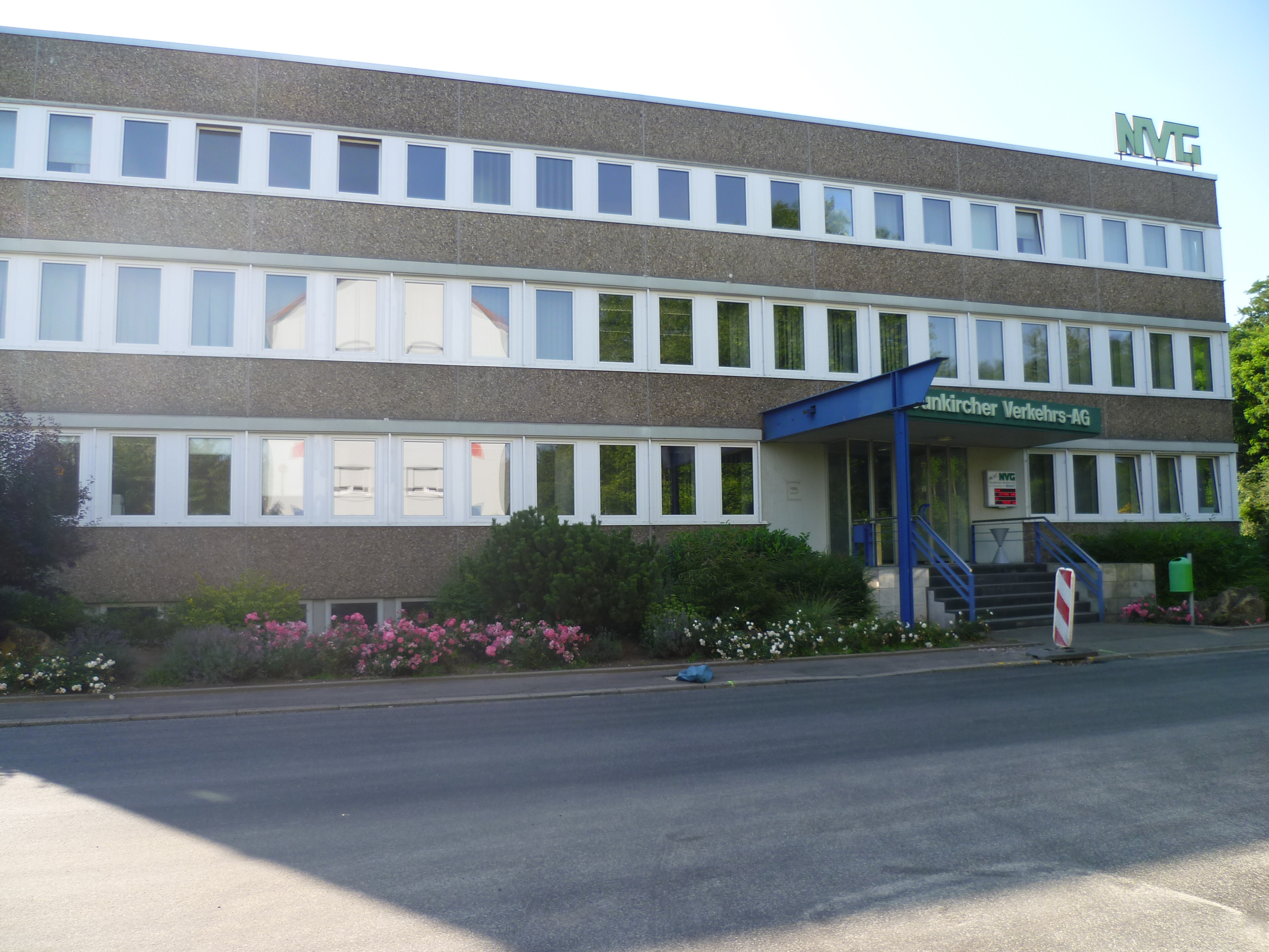 NVG-Hauptstelle in Neunkirchen Saar